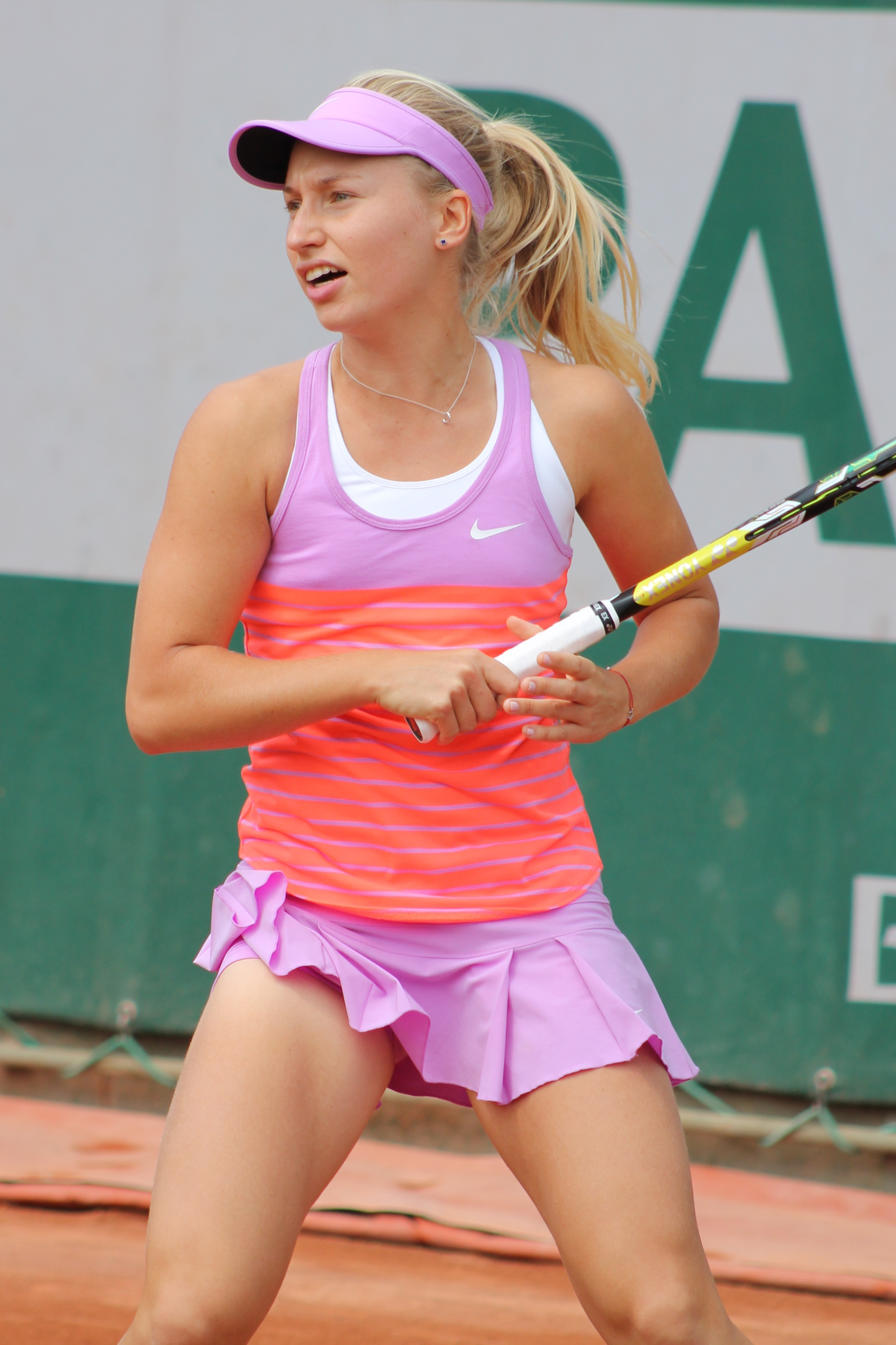 Gavrilova RG15 (21)